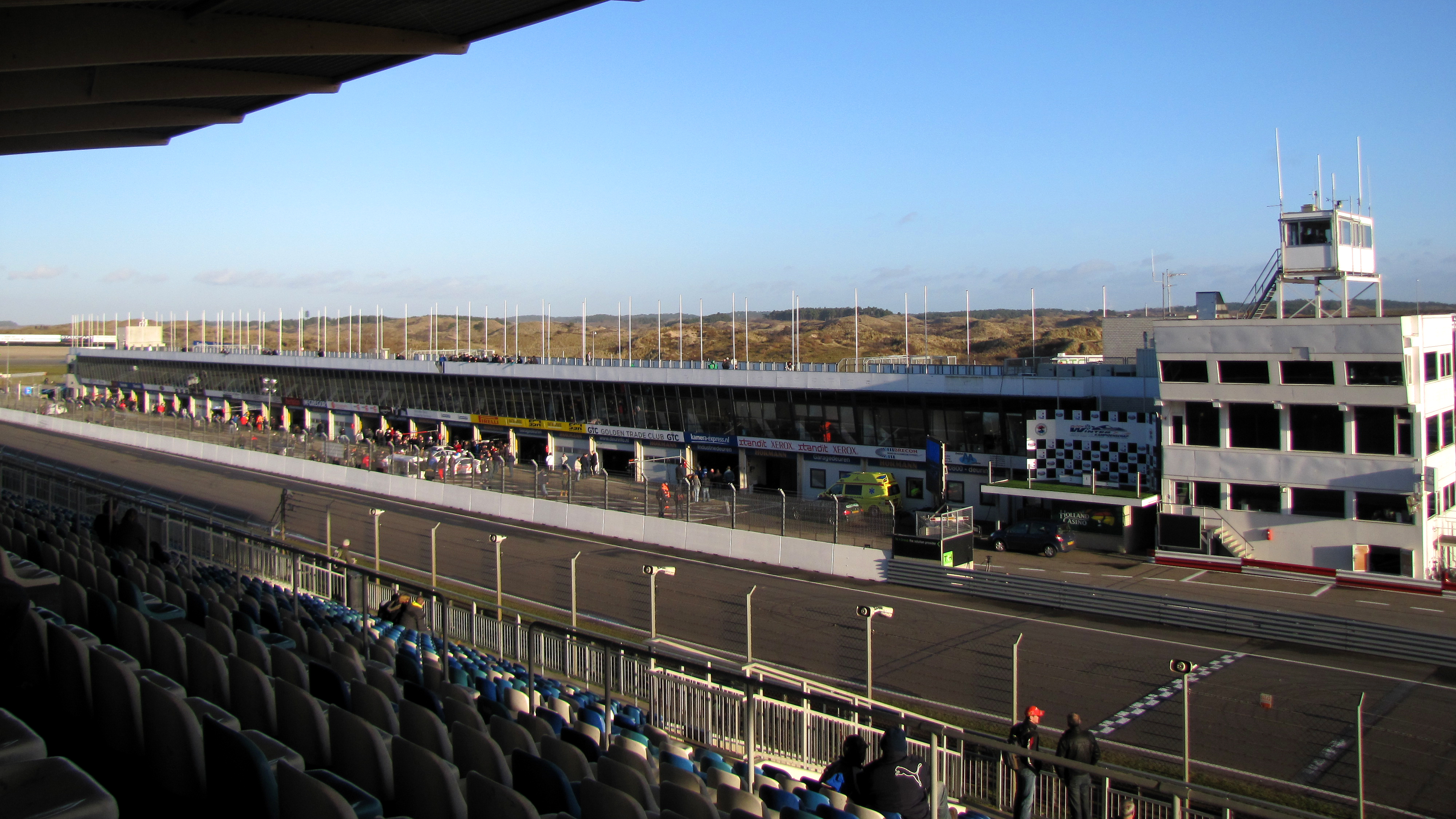 Haupttribüne und Paddock im Circuit Park Zandvoort